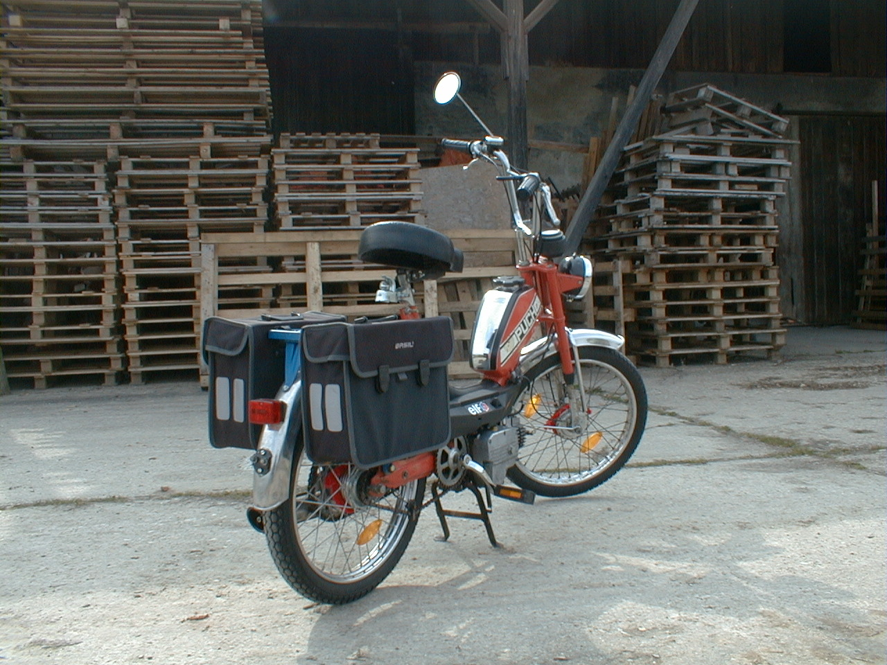 Puch X30 Baujahr 1976